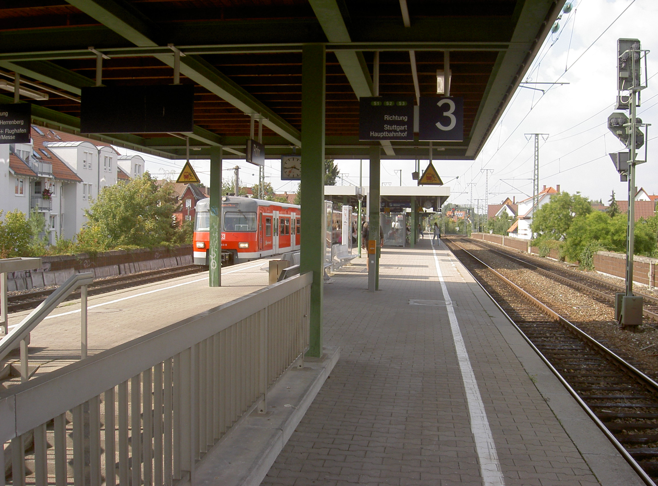 Haltepunkt Stuttgart-Rohr